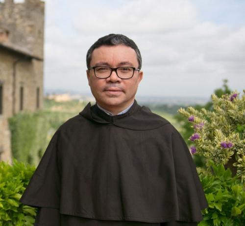 Bispo diocesano